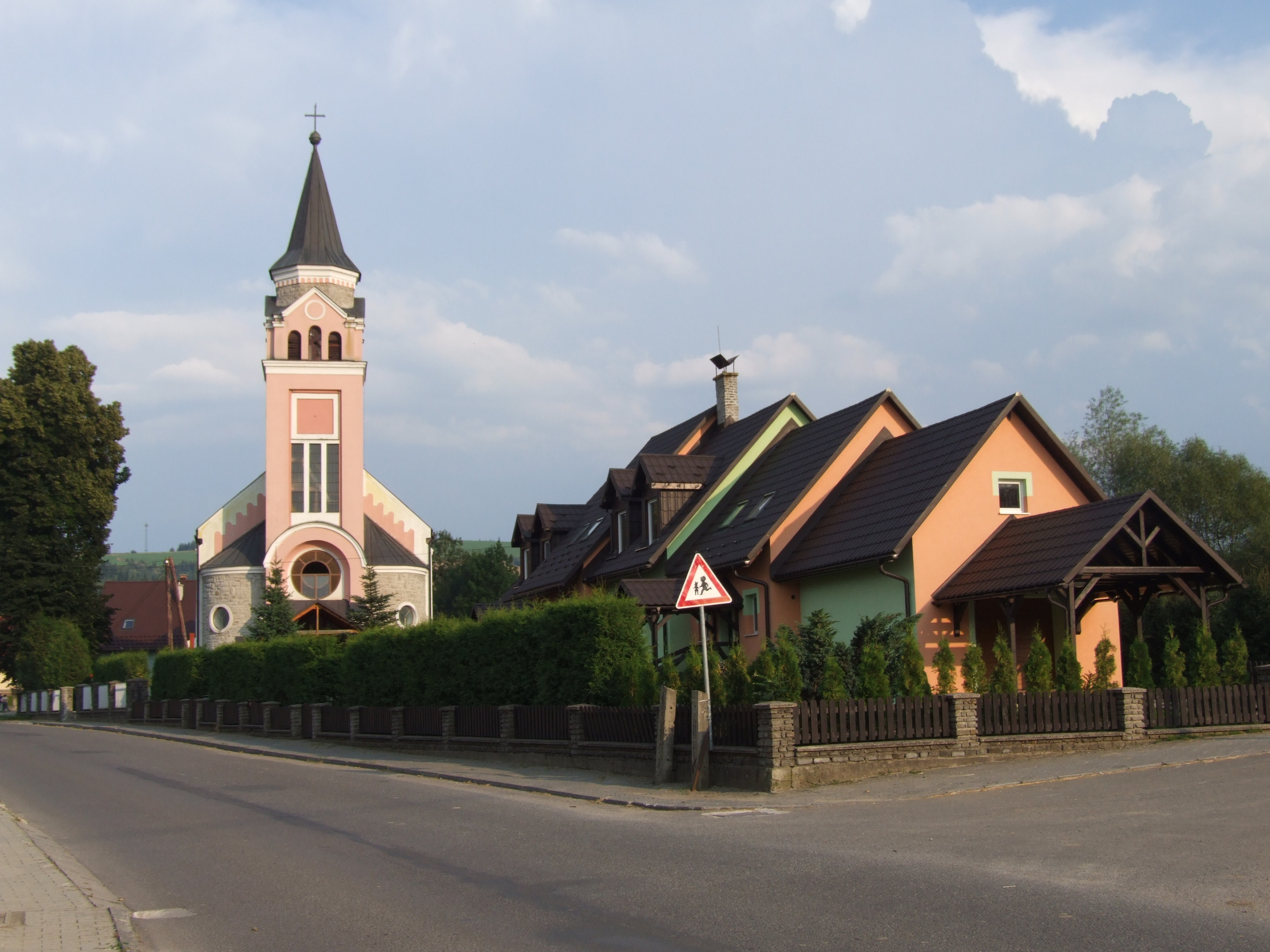 Vitanová.